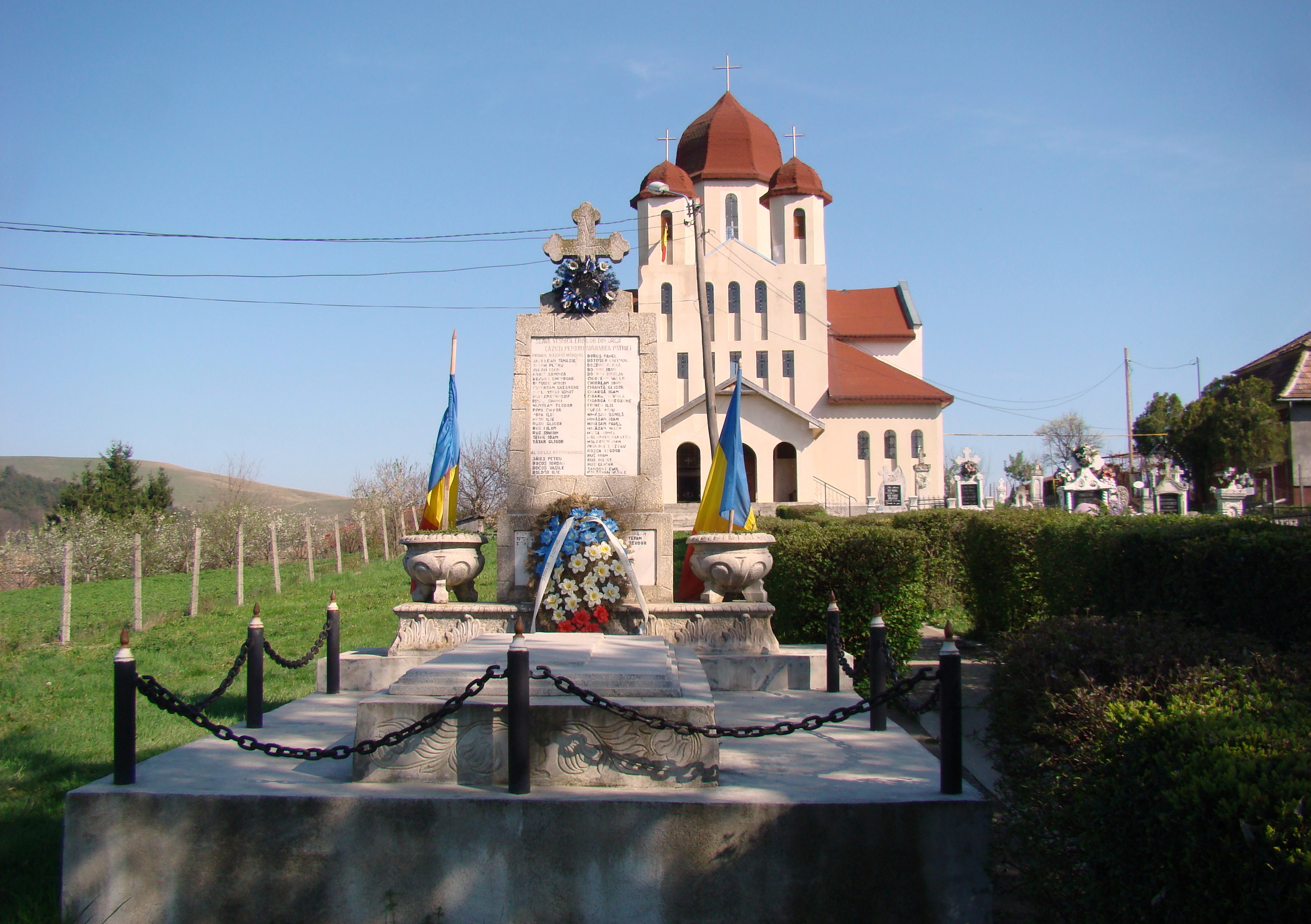 Biserica ortodoxă din Urca, județul Cluj